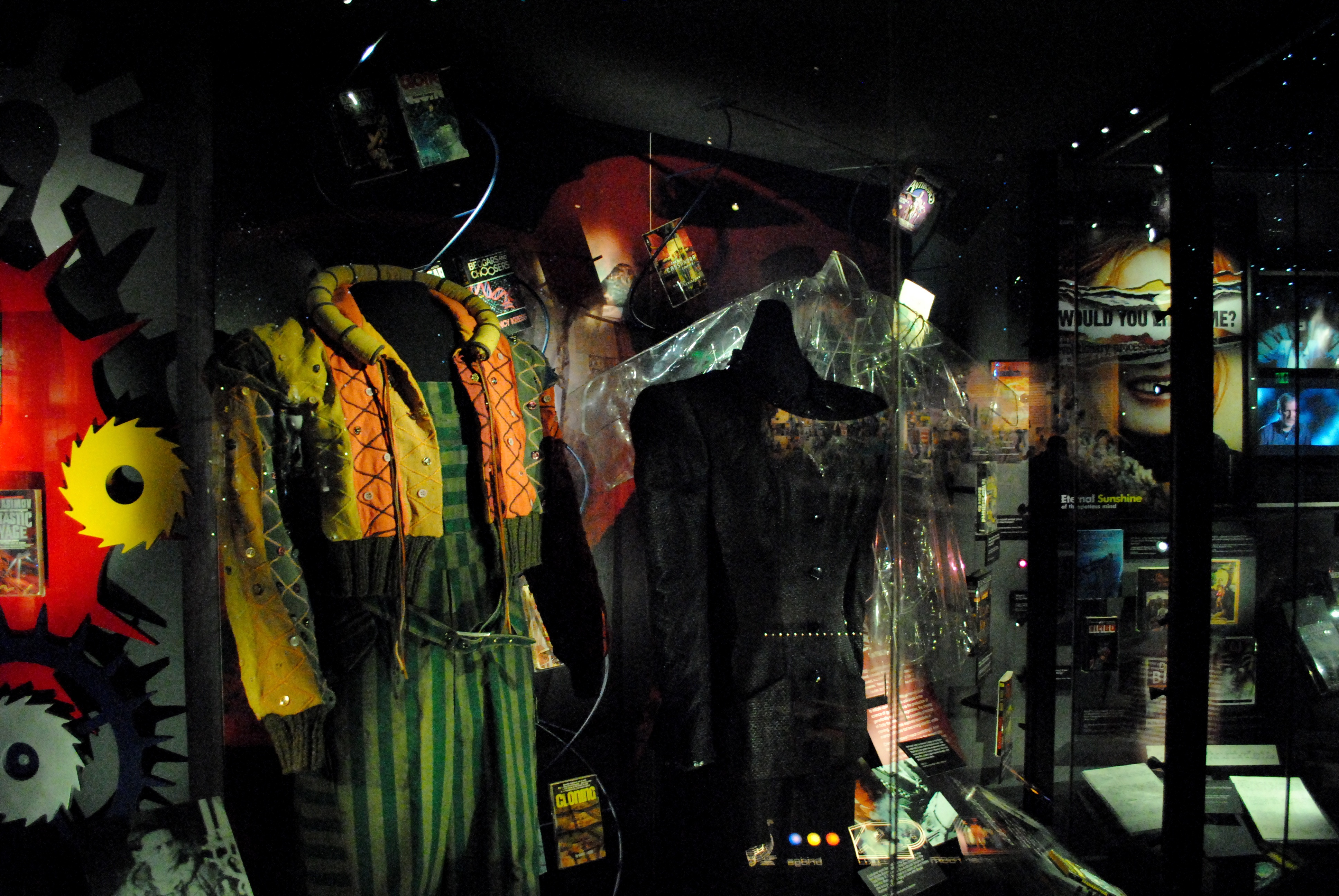 Blade Runner - 4768124514